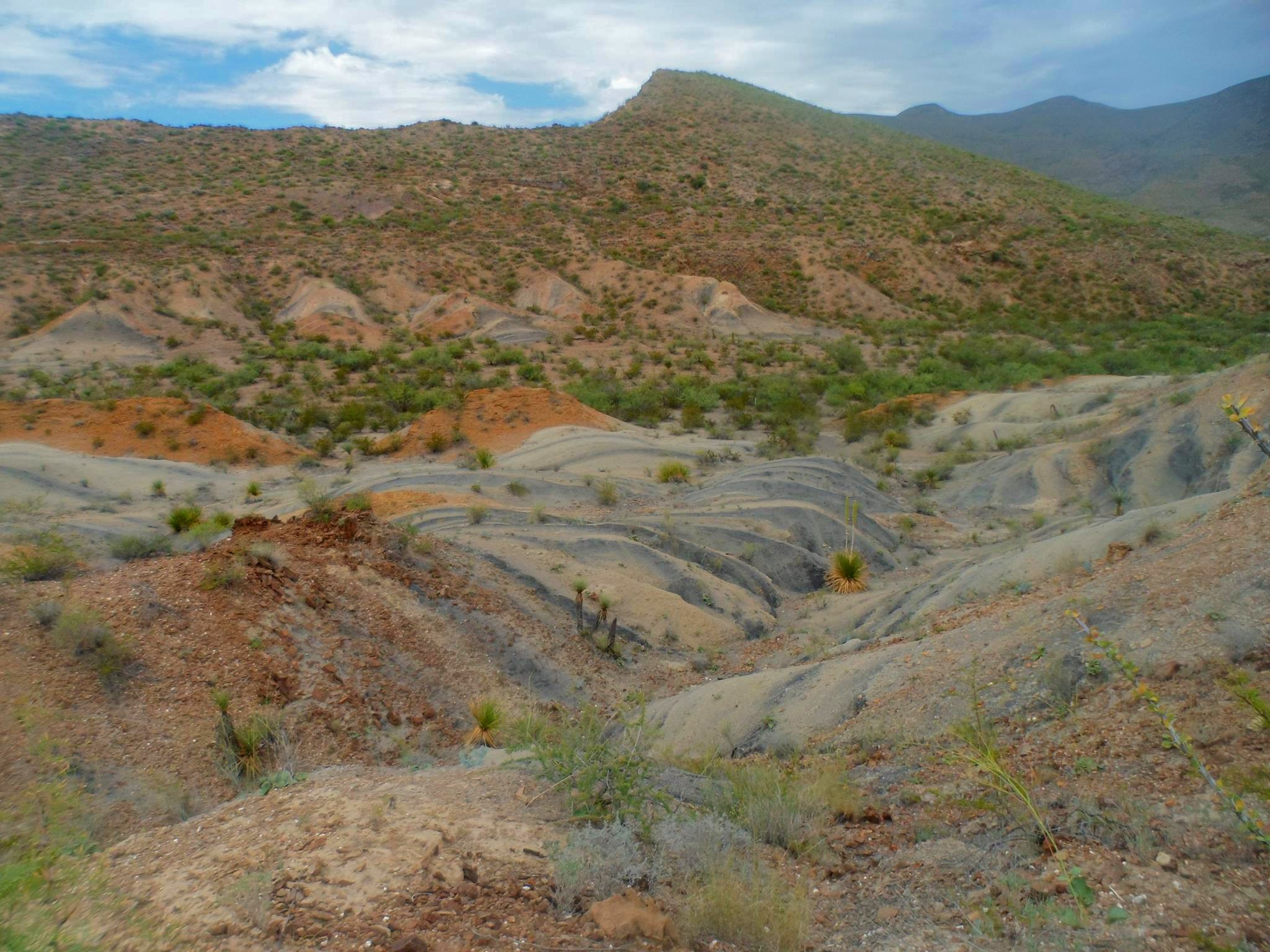 Pliegues sedimentarios de la Formación La Casita